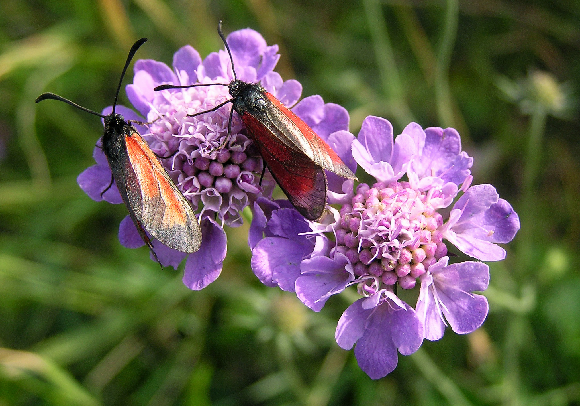 Thymian-Widderchen auf Tauben-Skabiose